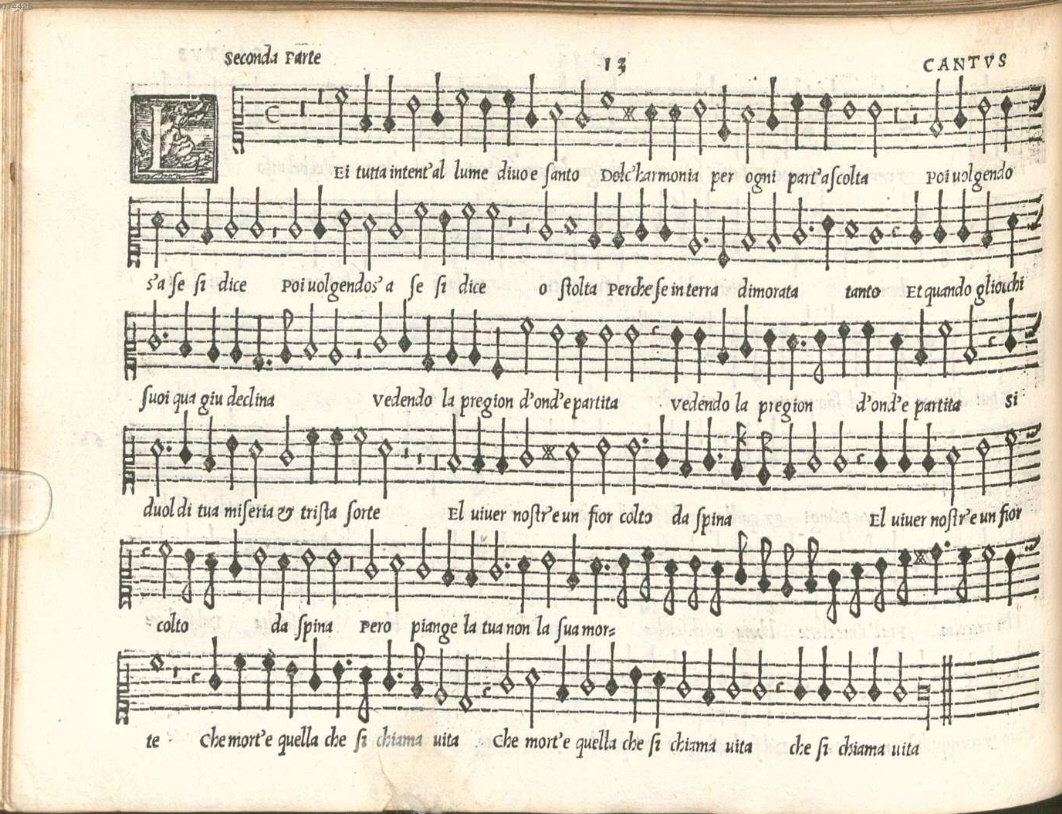 Фрагмент мадригала Киприана де Роре (публикация 1552 г.)